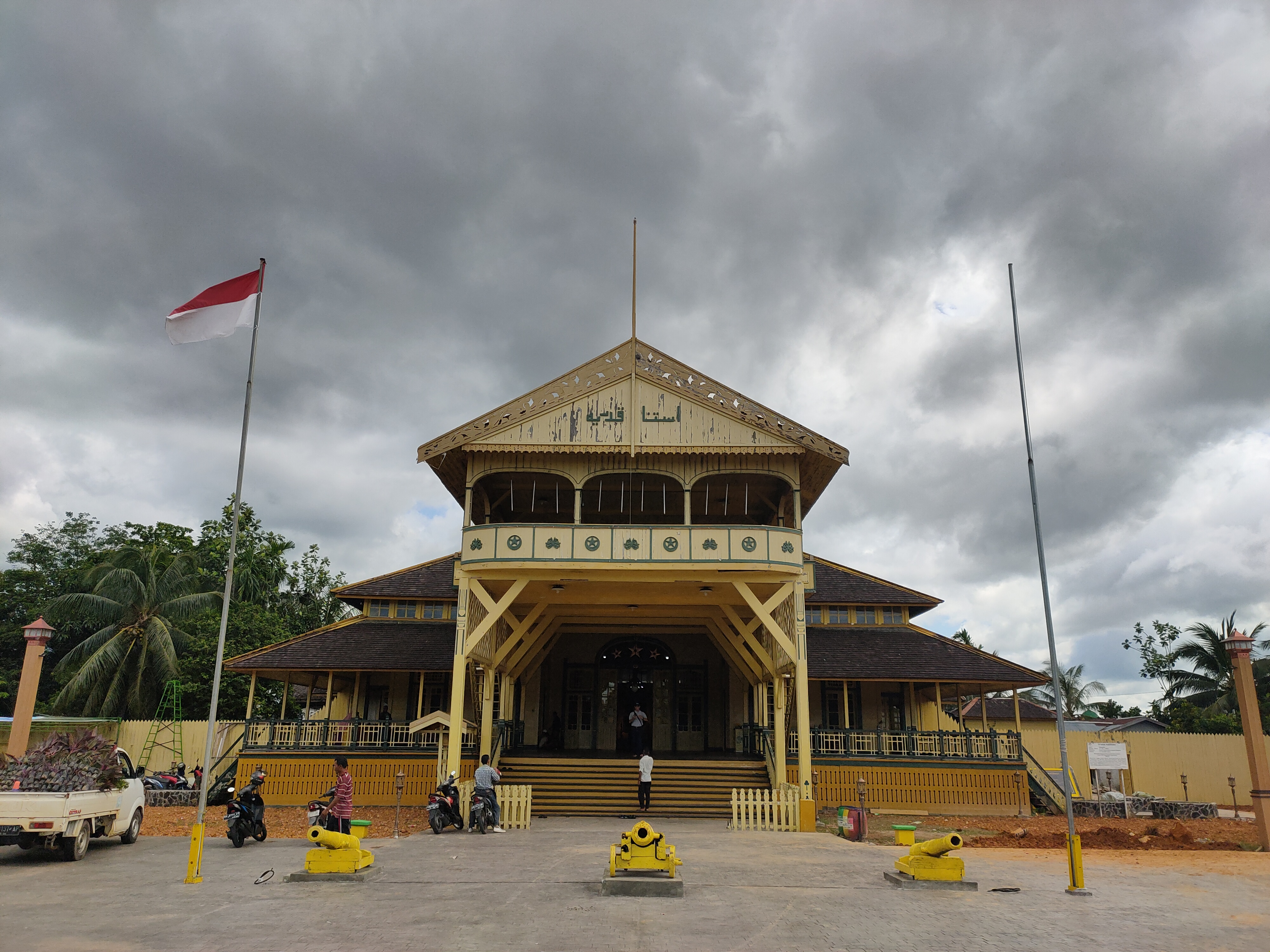 Keraton Kadariah adalah istana Kesultanan Pontianak yang dibangun pada dari tahun 1771 sampai 1778 masehi. Terletak di Jl. Tj. Raya 1, Dalam Bugis, Kec. Pontianak Tim., Kota Pontianak, Kalimantan Barat.